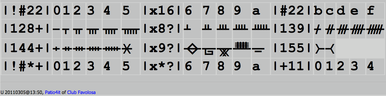 Ogham alfabet.